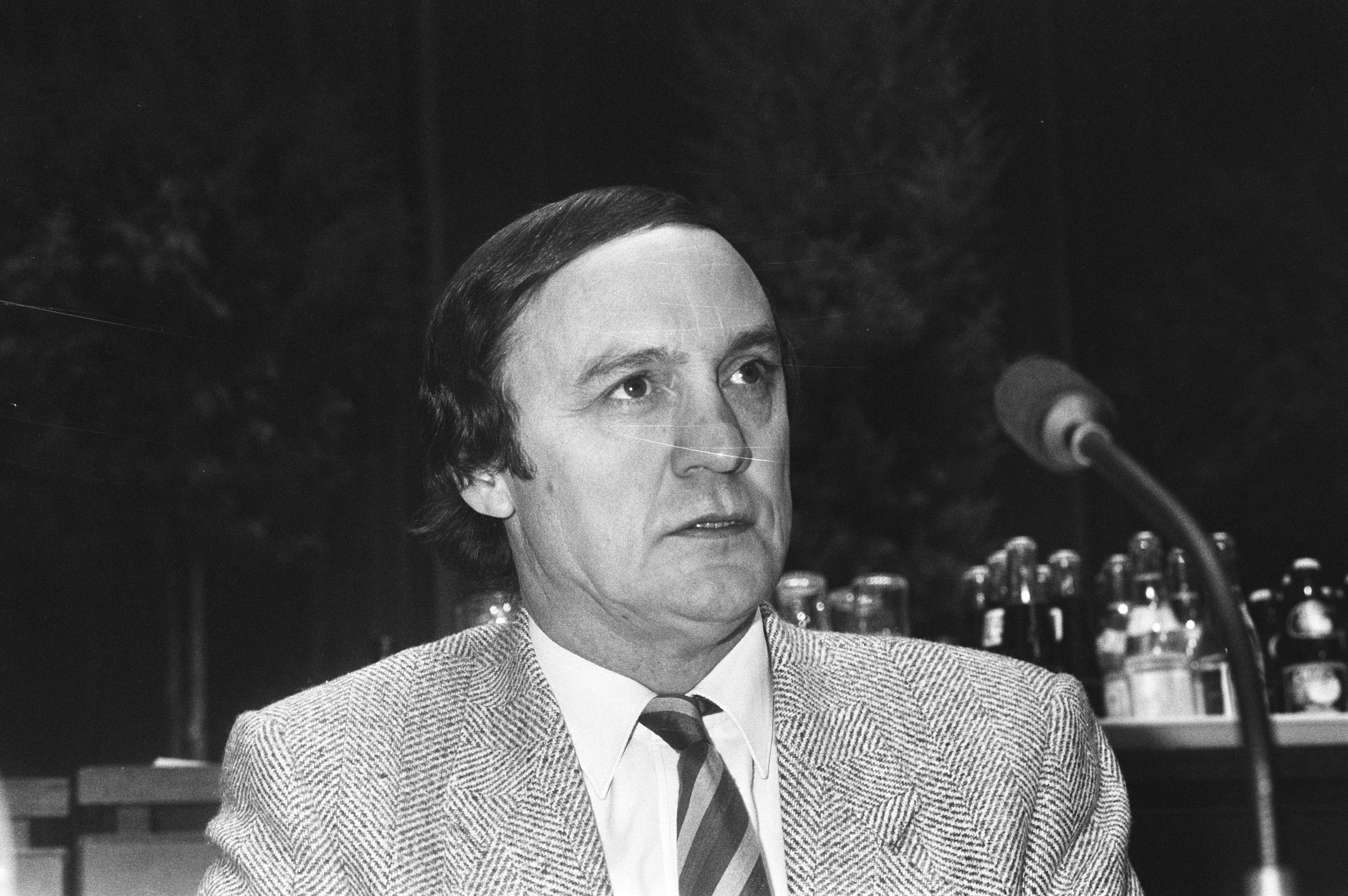 Collectie / Archief : Fotocollectie Anefo Reportage / Serie : Debat PvdA-verkiezingscongres RAI Beschrijving : Karel van Miert (SP, België) Datum : 14 februari 1986 Locatie : Amsterdam, Noord-Holland Trefwoorden : conferenties, politici, portretten Persoonsnaam : Miert, Karel van Instellingsnaam : RAI Fotograaf : Gerrits, Roland / Anefo, [onbekend] Auteursrechthebbende : Nationaal Archief Materiaalsoort : Negatief (zwart/wit) Nummer archiefinventaris : bekijk toegang 2.24.01.05 Bestanddeelnummer : 933-5684